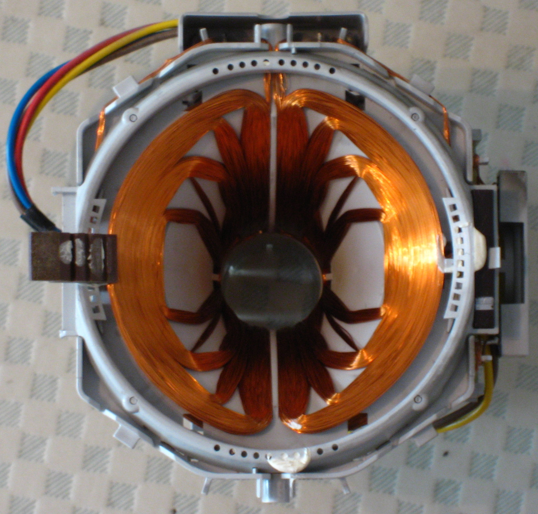 Katodisädeputken pysty- ja juovapoikkeutuskelat.